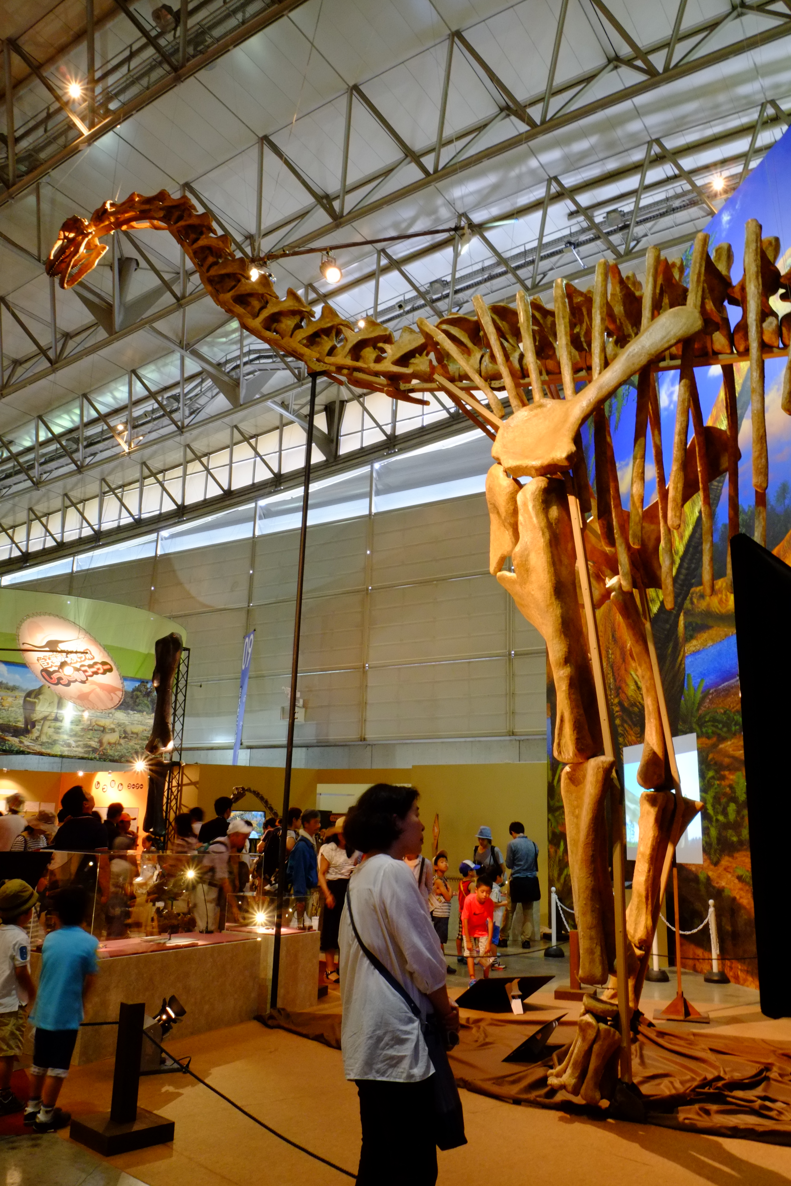 ヨーロッパ最大の恐竜トゥリアサウルス。 これの発見でディプロドクス類やティタノサウルス形類などの新竜脚類だけではなく、新竜脚類以外においても体サイズの巨大化が起きている事が示されたんだって。